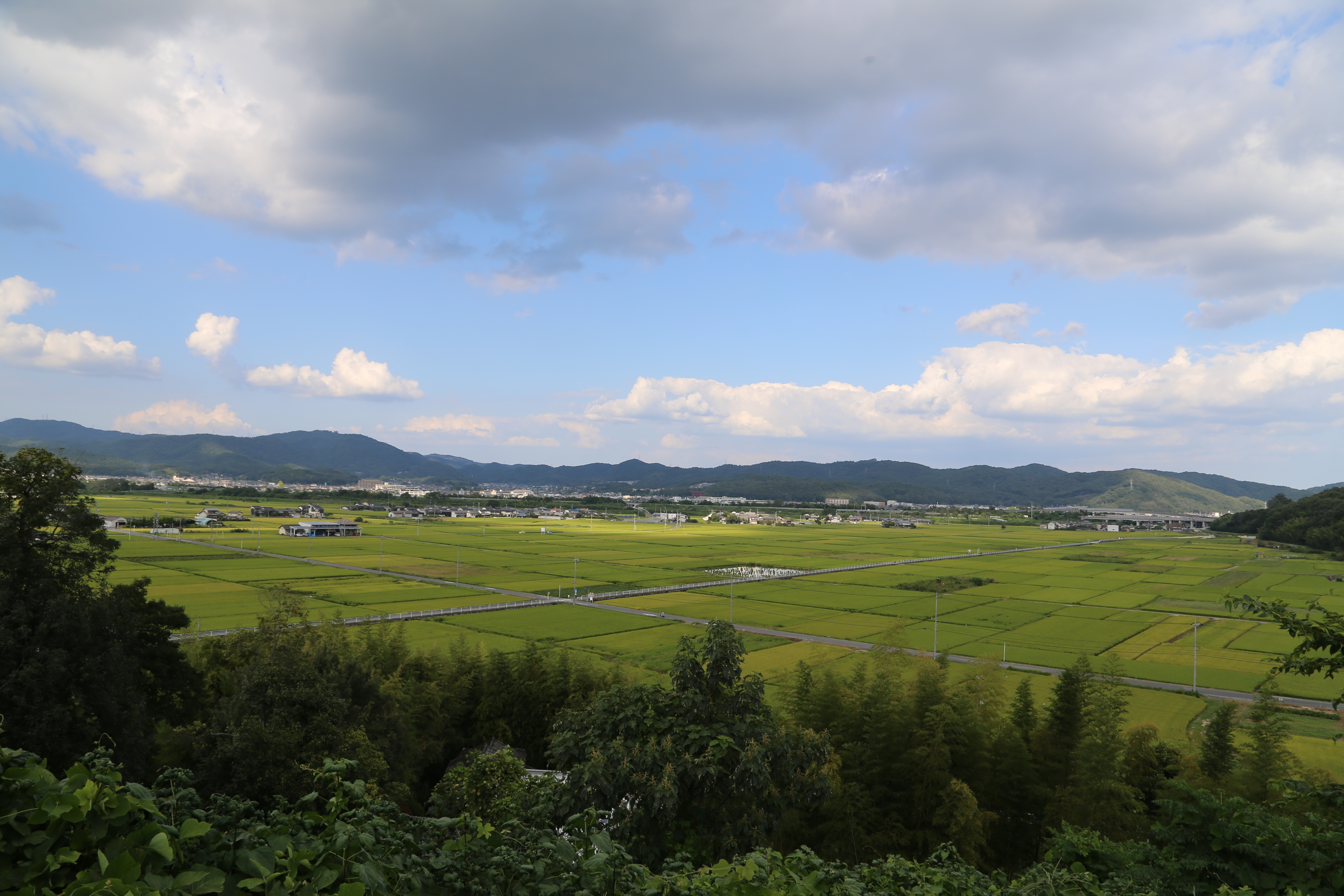 岡山県岡山市北区の造山古墳から備中高松城方面を望む。